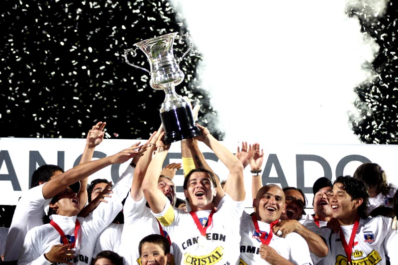 Colo-Colo, campeón del Torneo de Clausura 2006 del fútbol chilenoColo Colo Campeon15